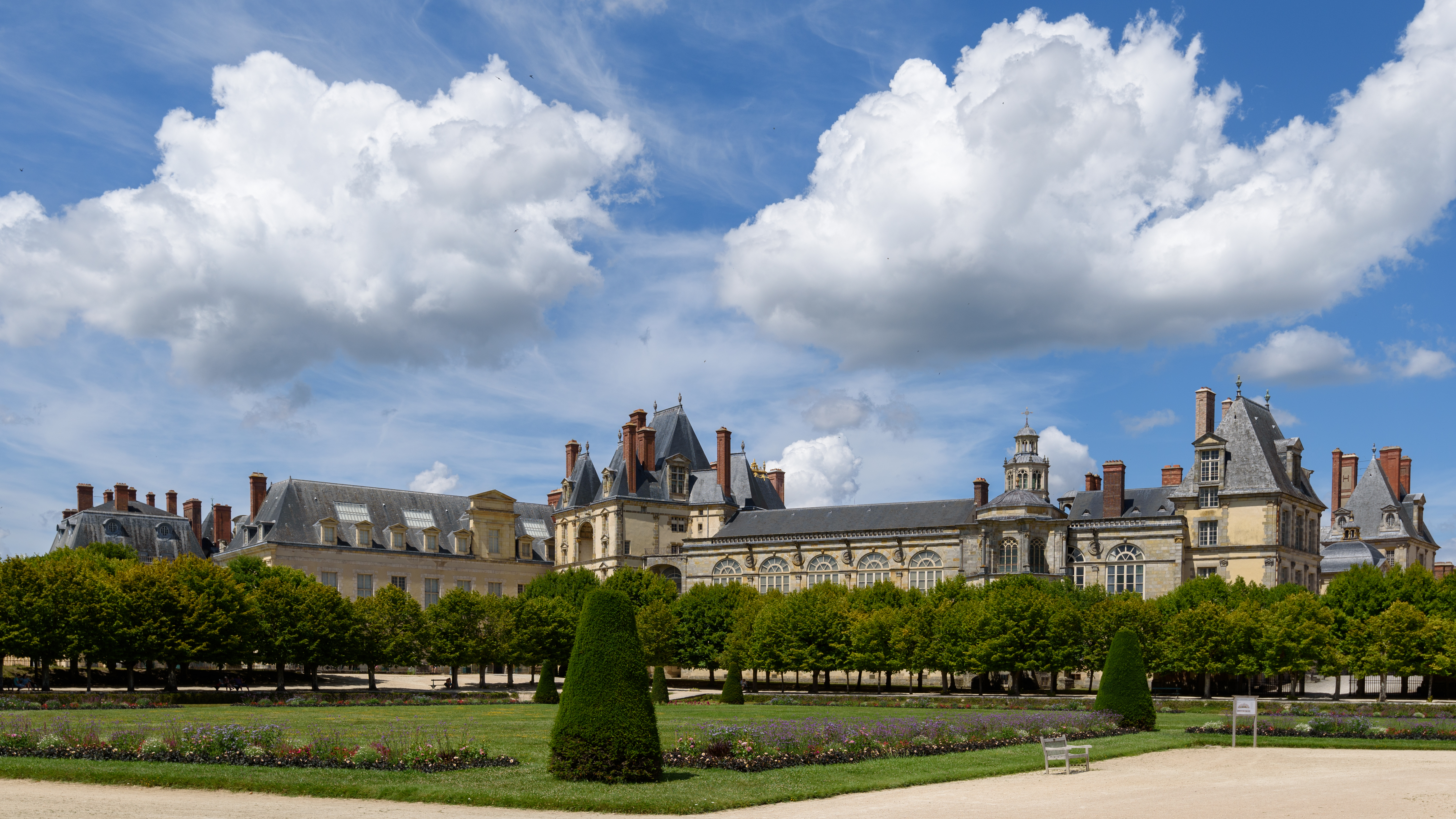 Château de Fontainebleau, France